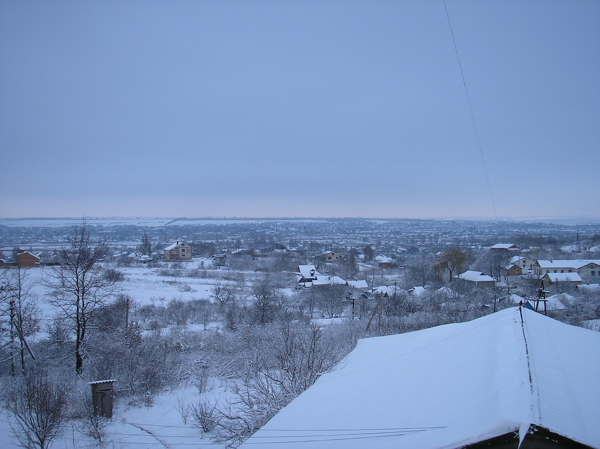 Вид Барвенково с вышки ретранслятора